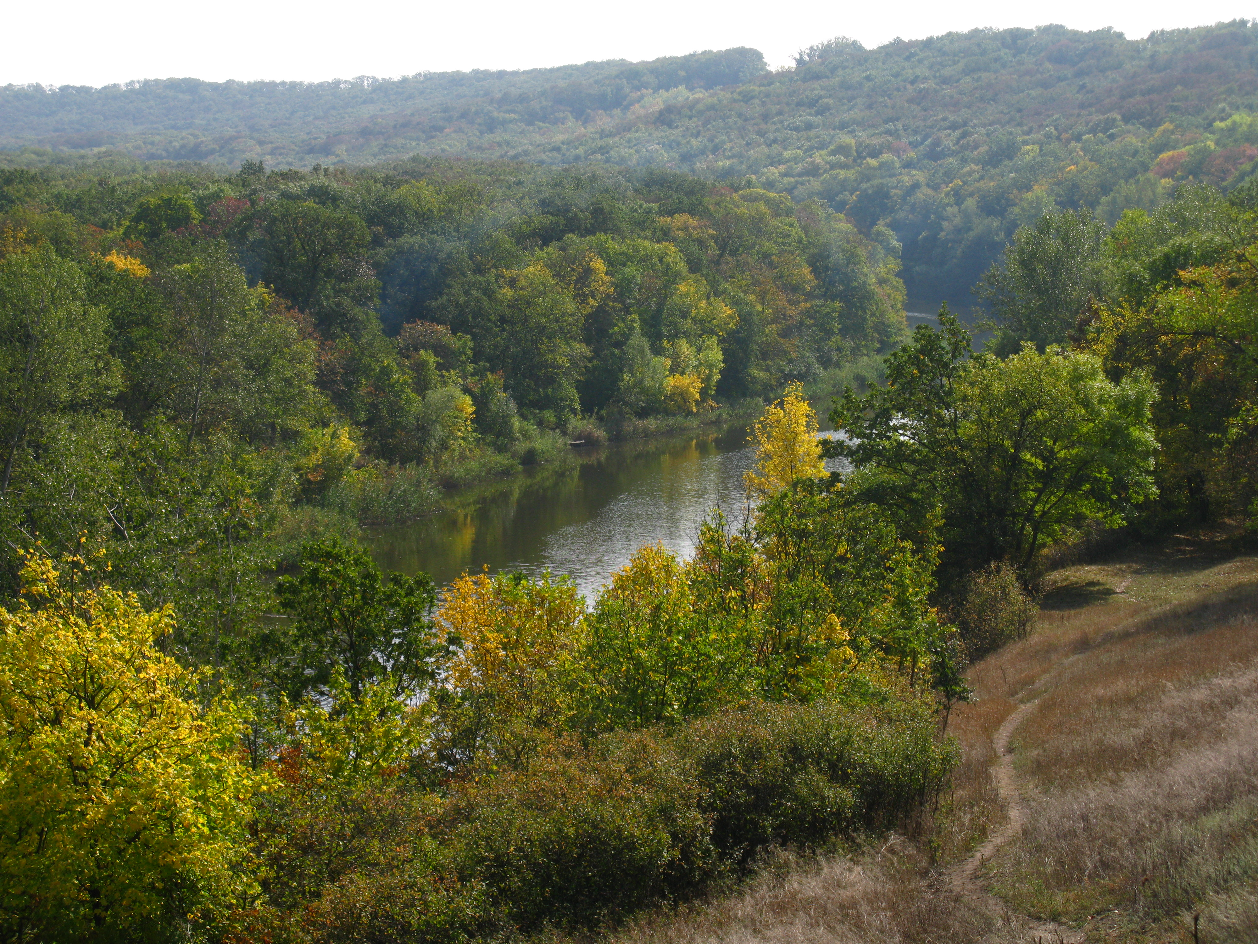 Вільнянські вікові дуби, Новомосковський р-н, між селами Вільне та Гвардійське, Новомосковський військлісгосп кв. 200, діл. 2